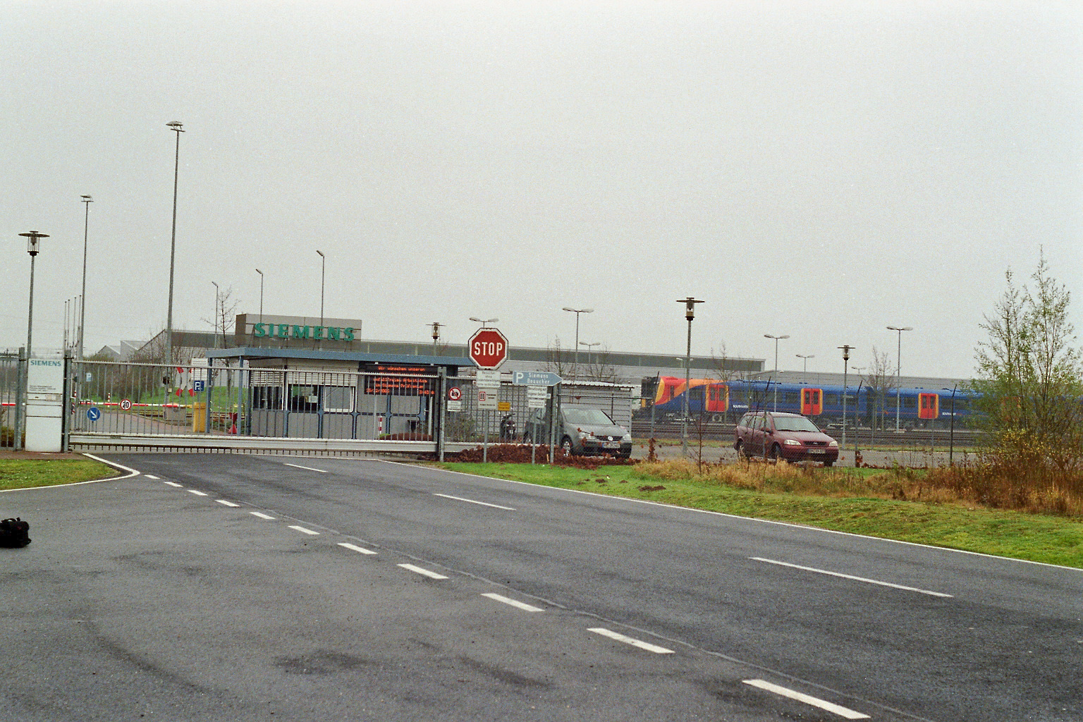 Das Werkstor des Prüfcenter Wegberg-Wildenrath mit British Rail Class 450